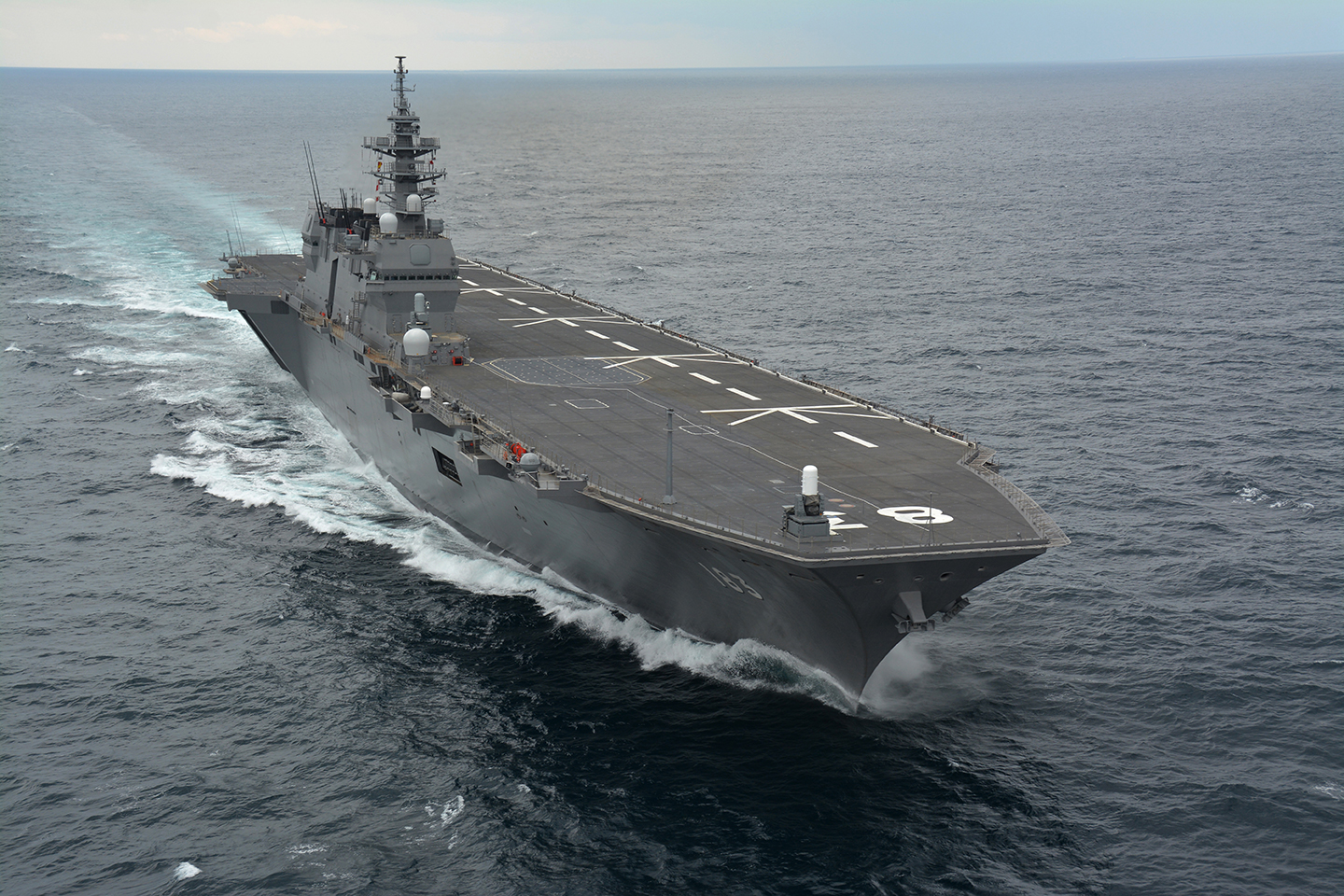 DDH-183 いずも